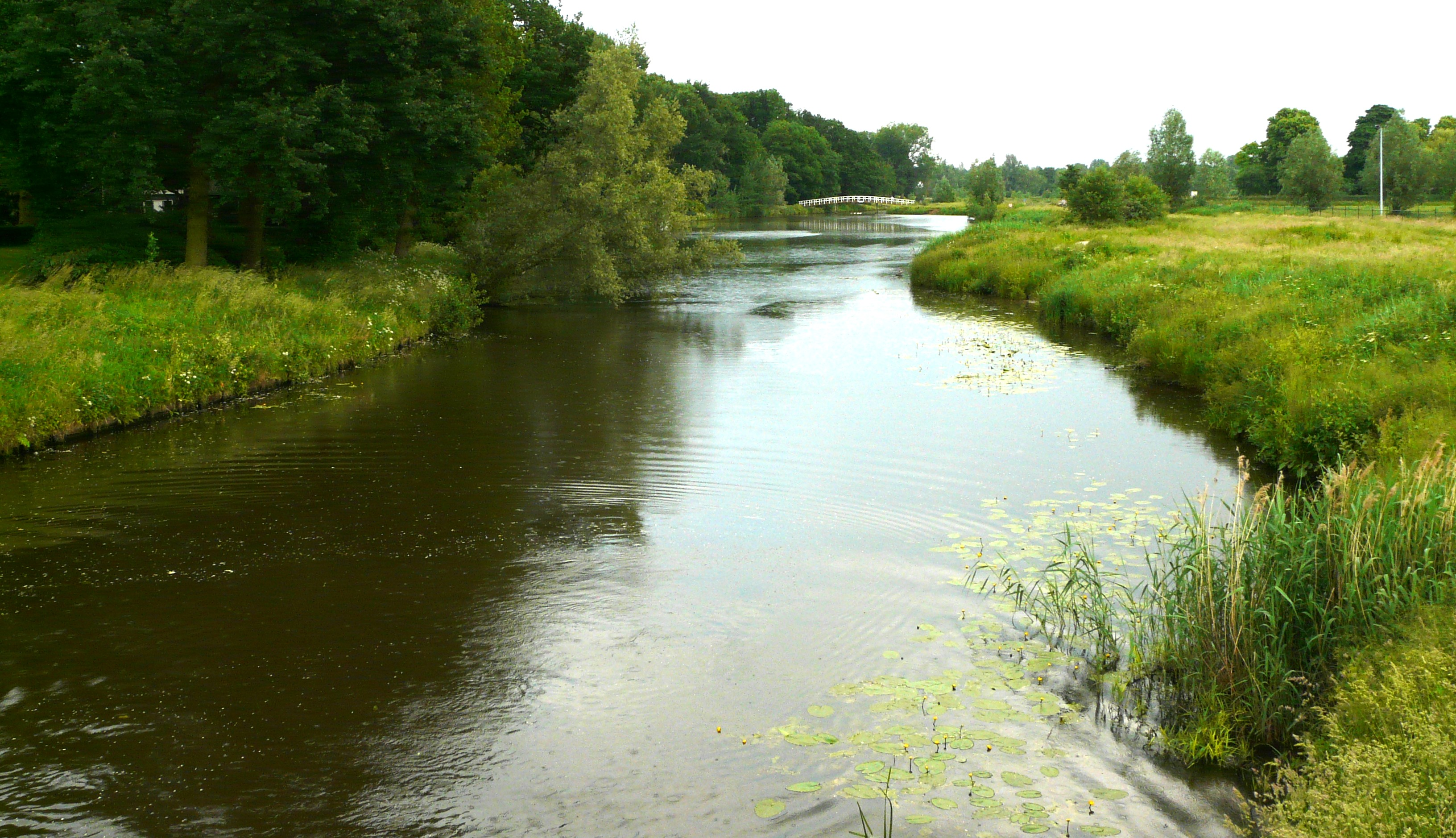 Zicht op rivier de Mark gezien vanaf de Duivelsbruglaan en de Duivelsbrug met zicht in de verte op de Vrijtlandbrug over de Mark, gelegen nabij de Ginnekenmarkt in de wijk het Ginneken in het zuiden van Breda